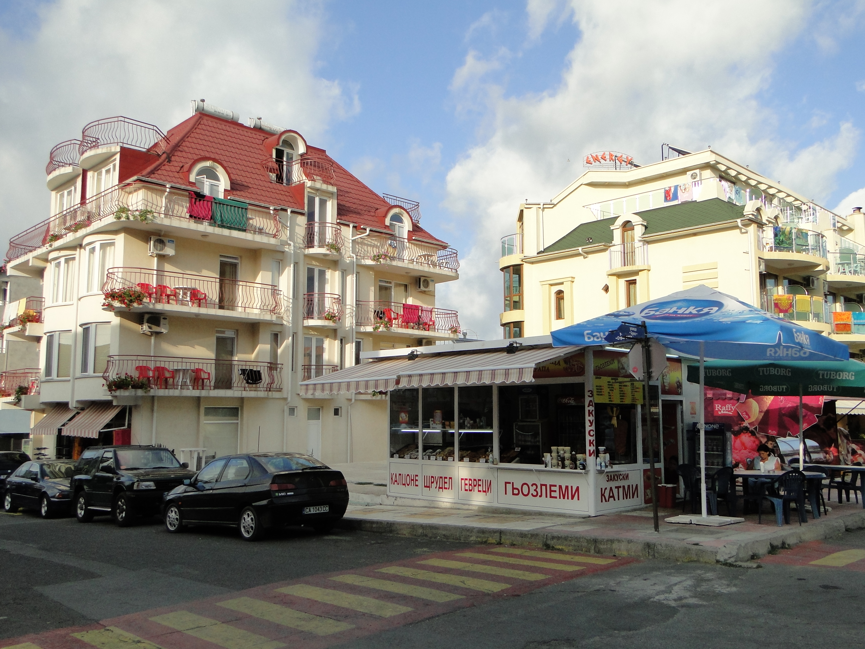 Китен Bulgaria